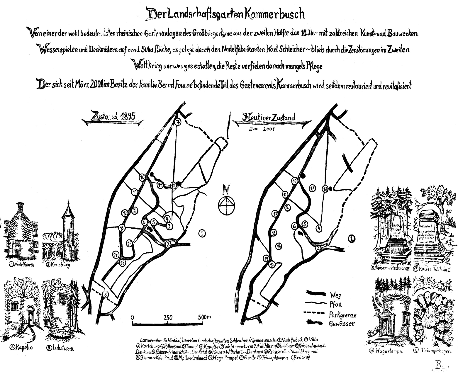 Informationstafel Landschaftsgarten Kammerbusch.